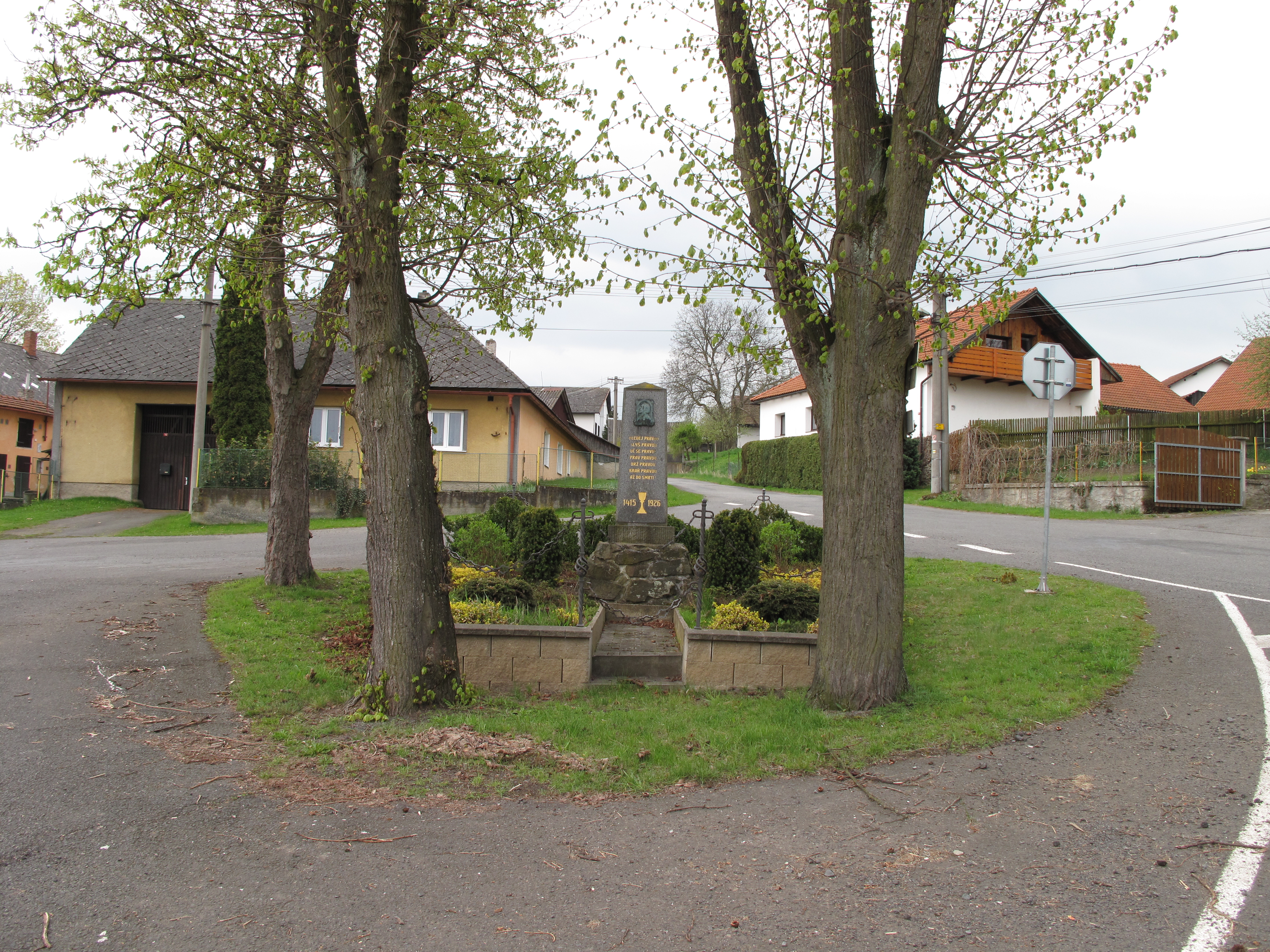 Černíkov. Okres Klatovy, Česká republika.